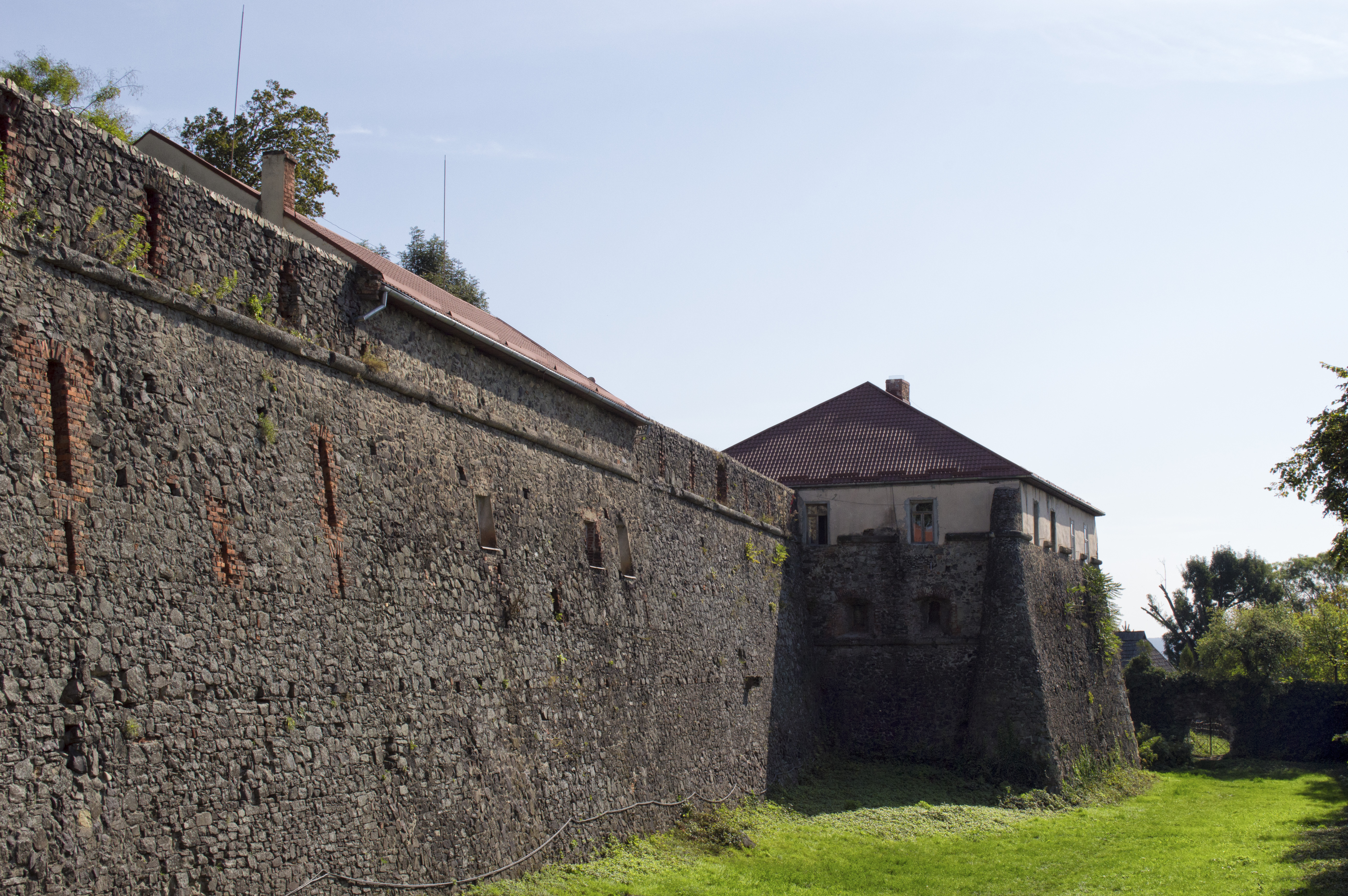 Замок-фортеця (мур.), Ужгород, вул.Капітульна, 33